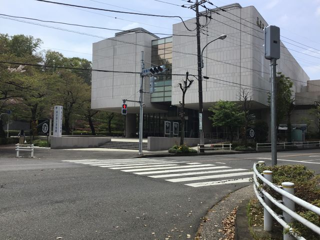 Tokyo_Fuji_Gallery,Hachioji,Tokyo,Japan